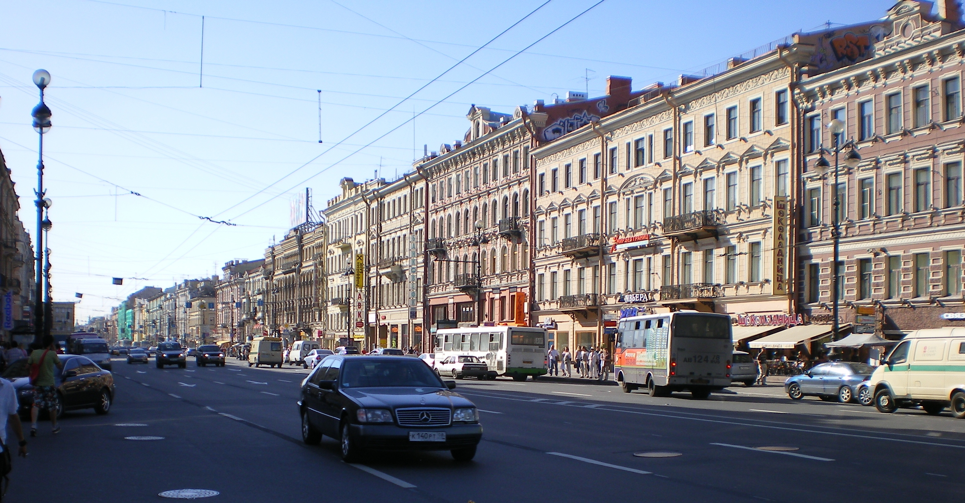 Невский проспект 96-110